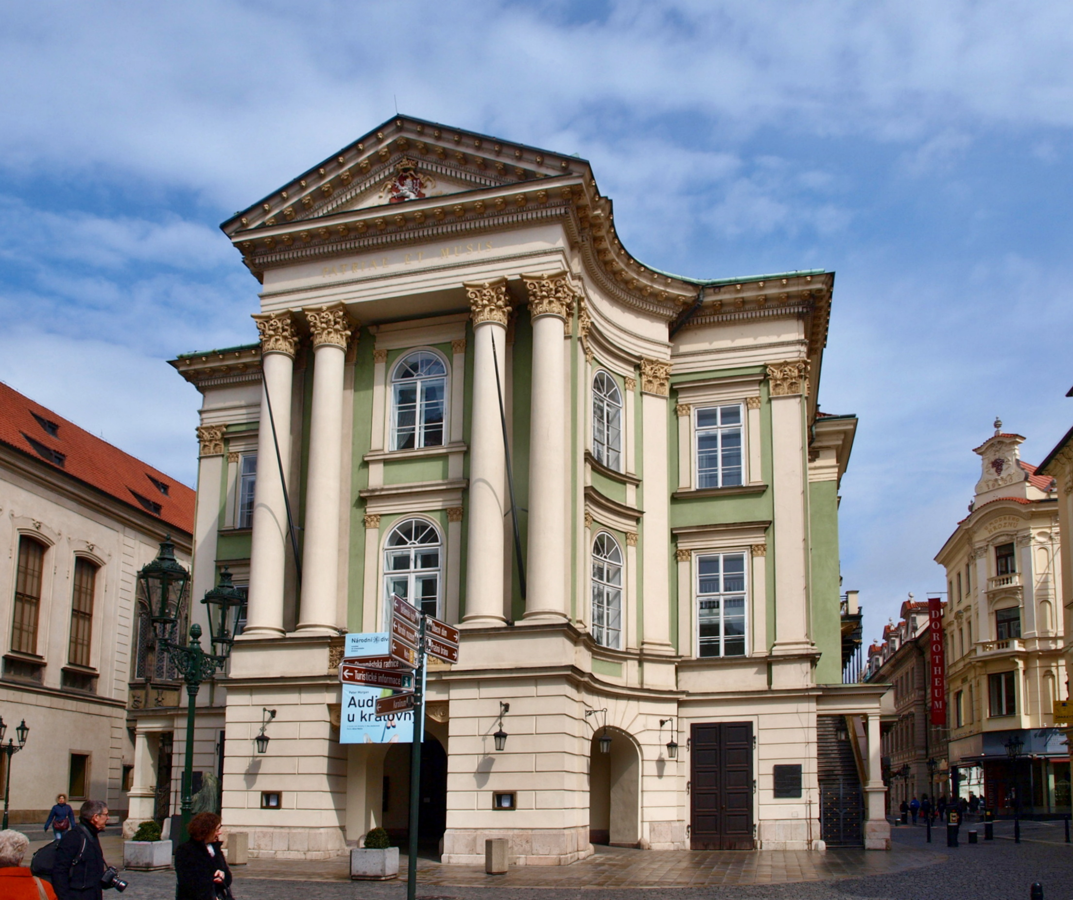 Stavovské divadlo v Praze